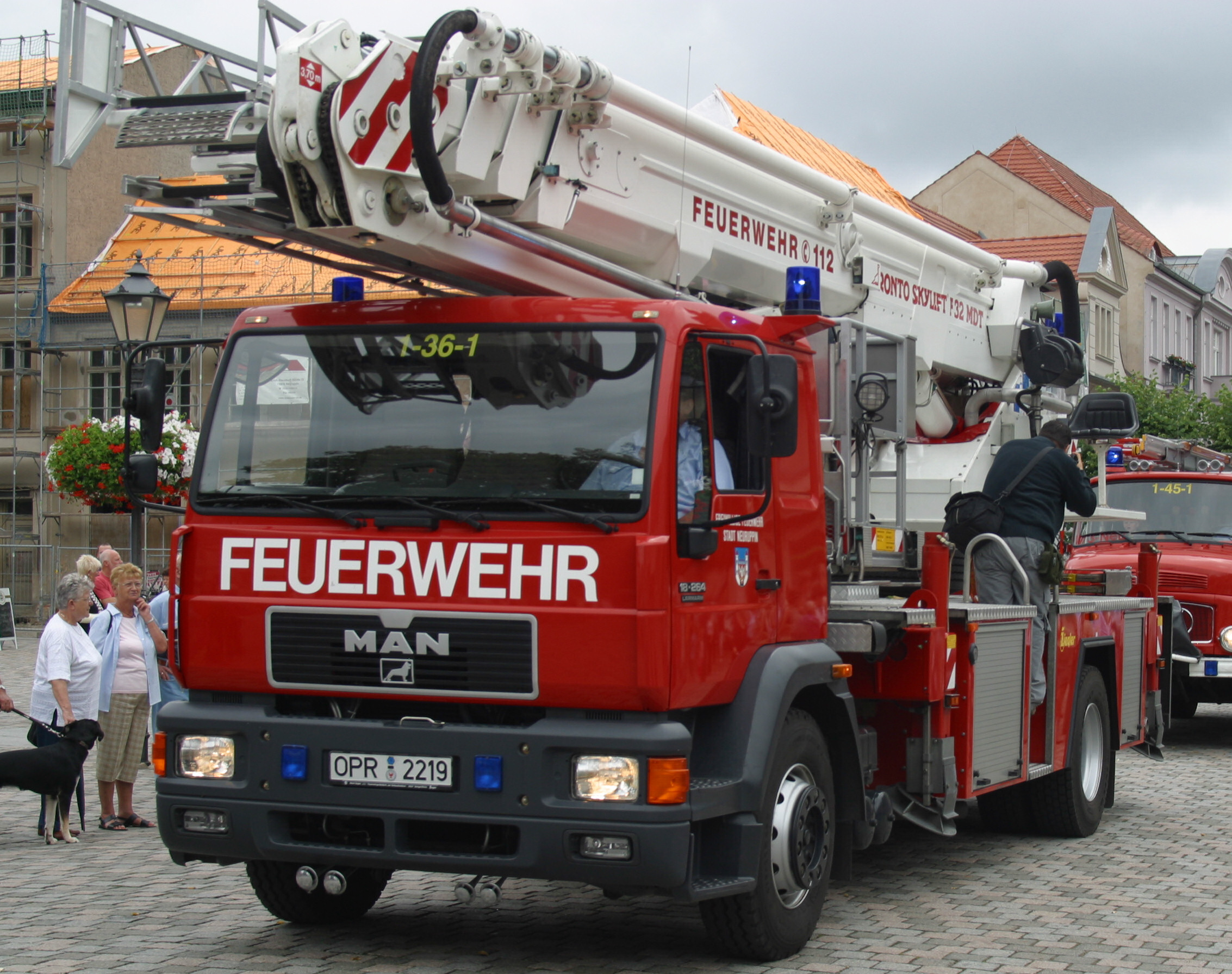 Bronto Skylift F32 MDT als TM32 der FFW Neuruppin MAN 18.264